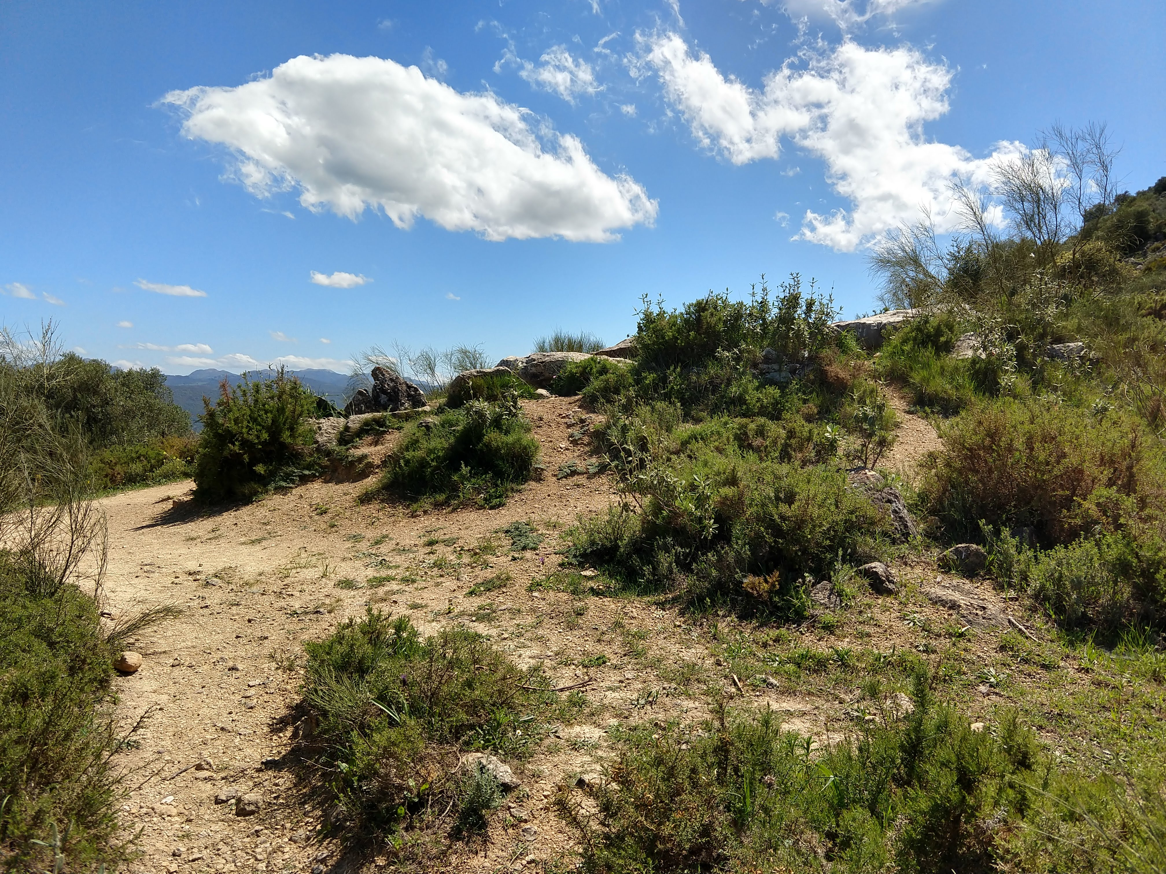 Vista lateral del Dolmen del Gigante, en Montecorto, en abril de 2018.